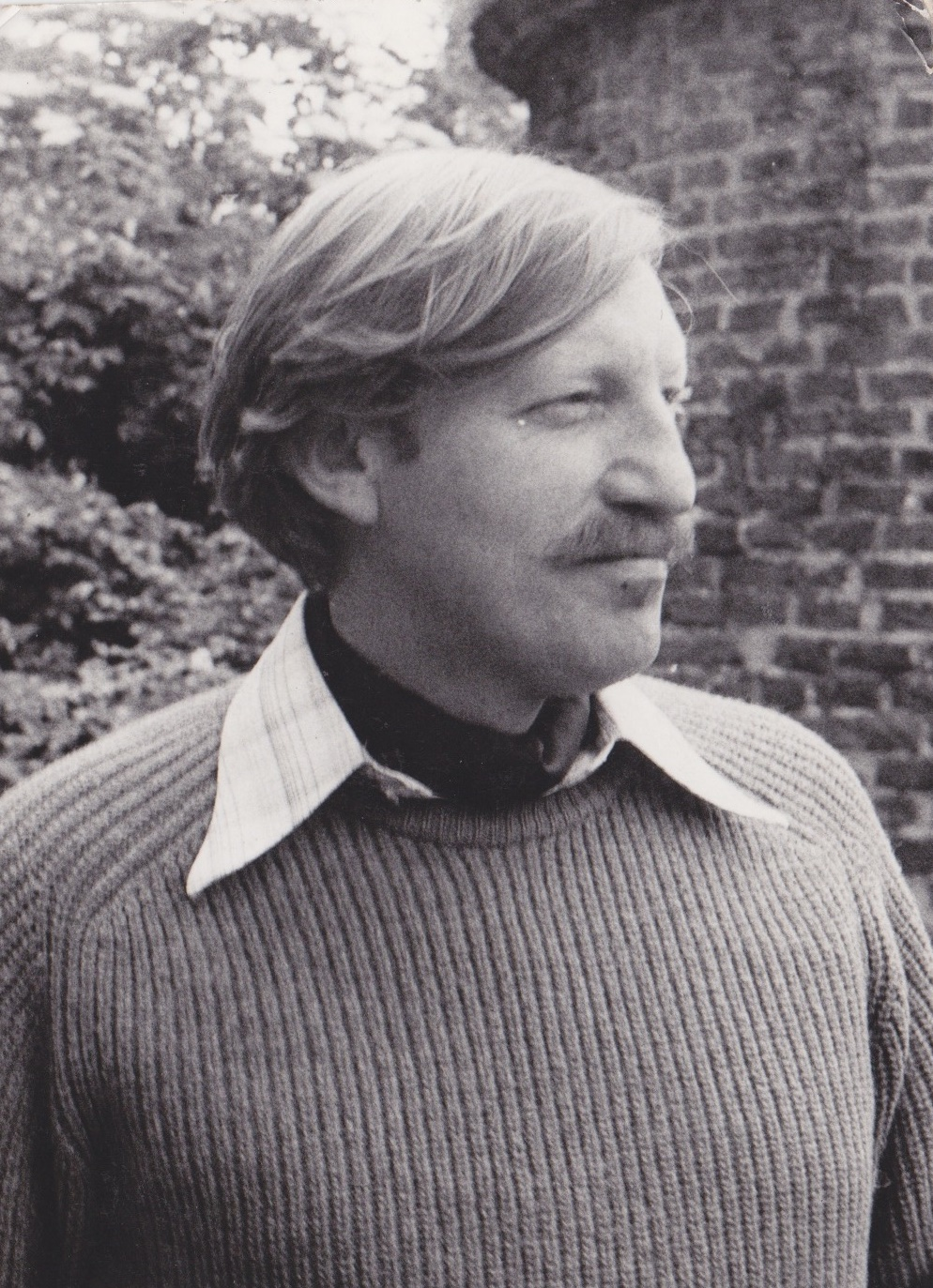 Porträtfotografie von Dr. phil. Hayo Vierck